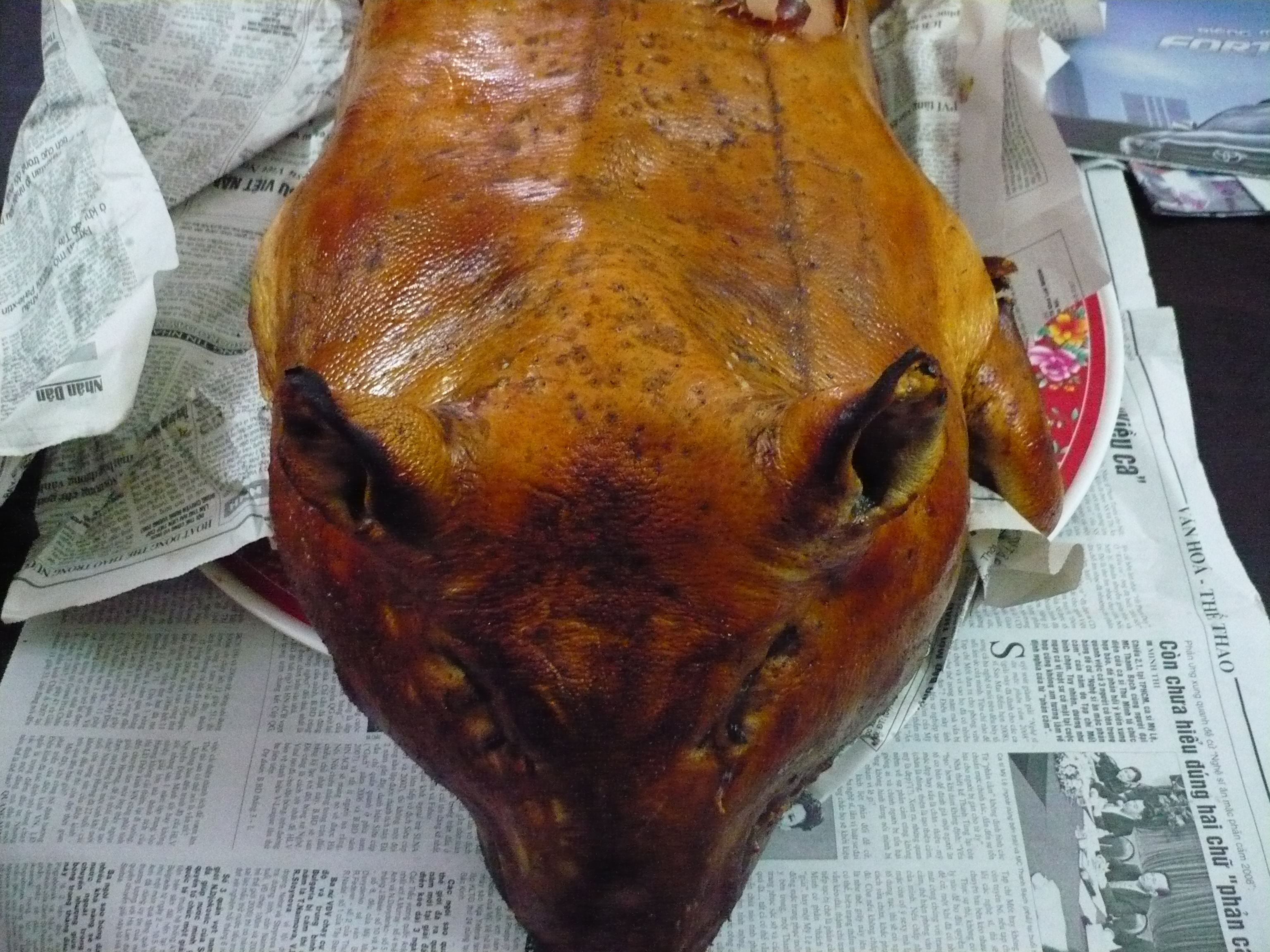 Chụp hình bằng máy ảnh